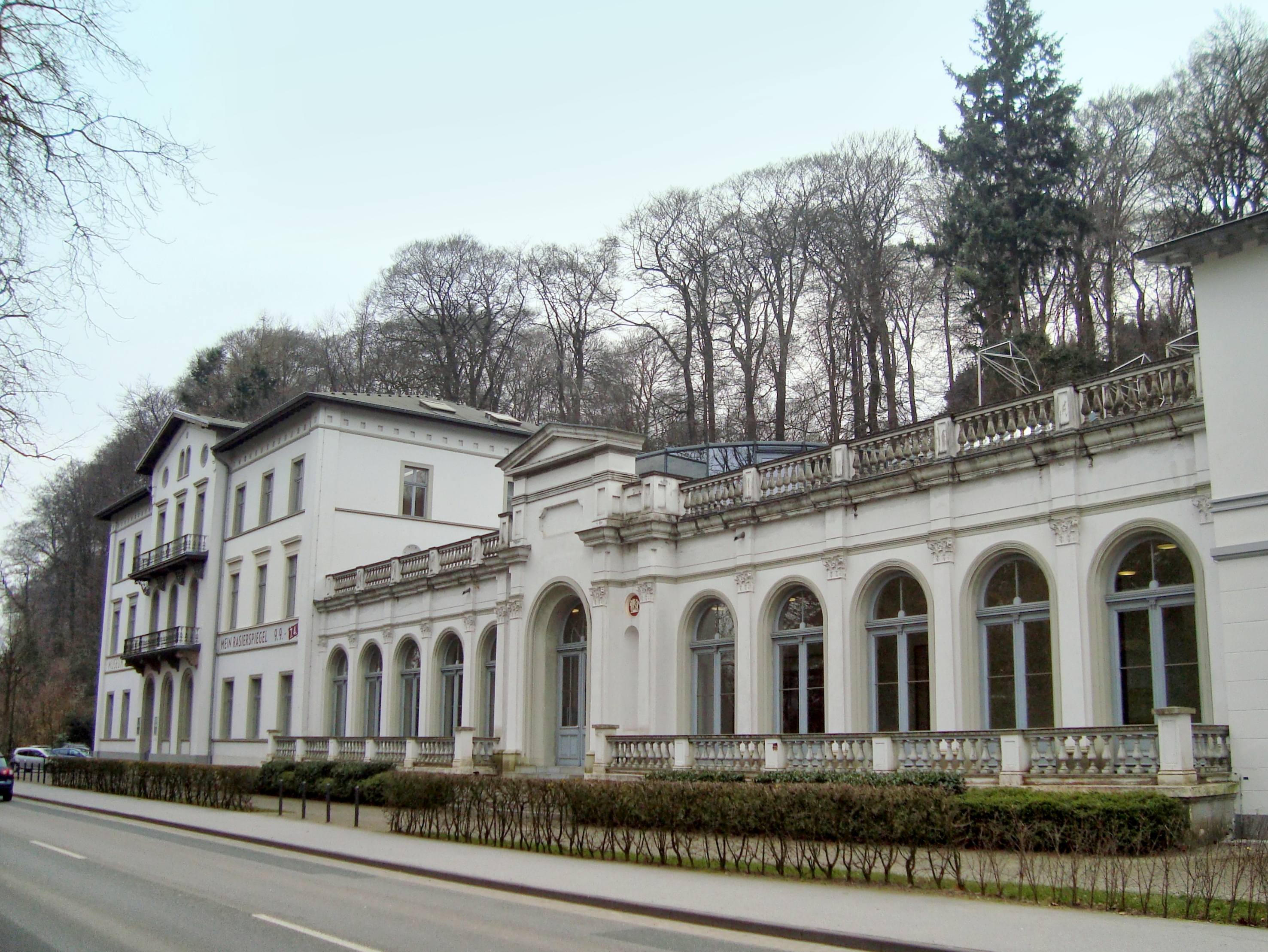 Museums Kurhaus Kleve, Ansicht von Westen